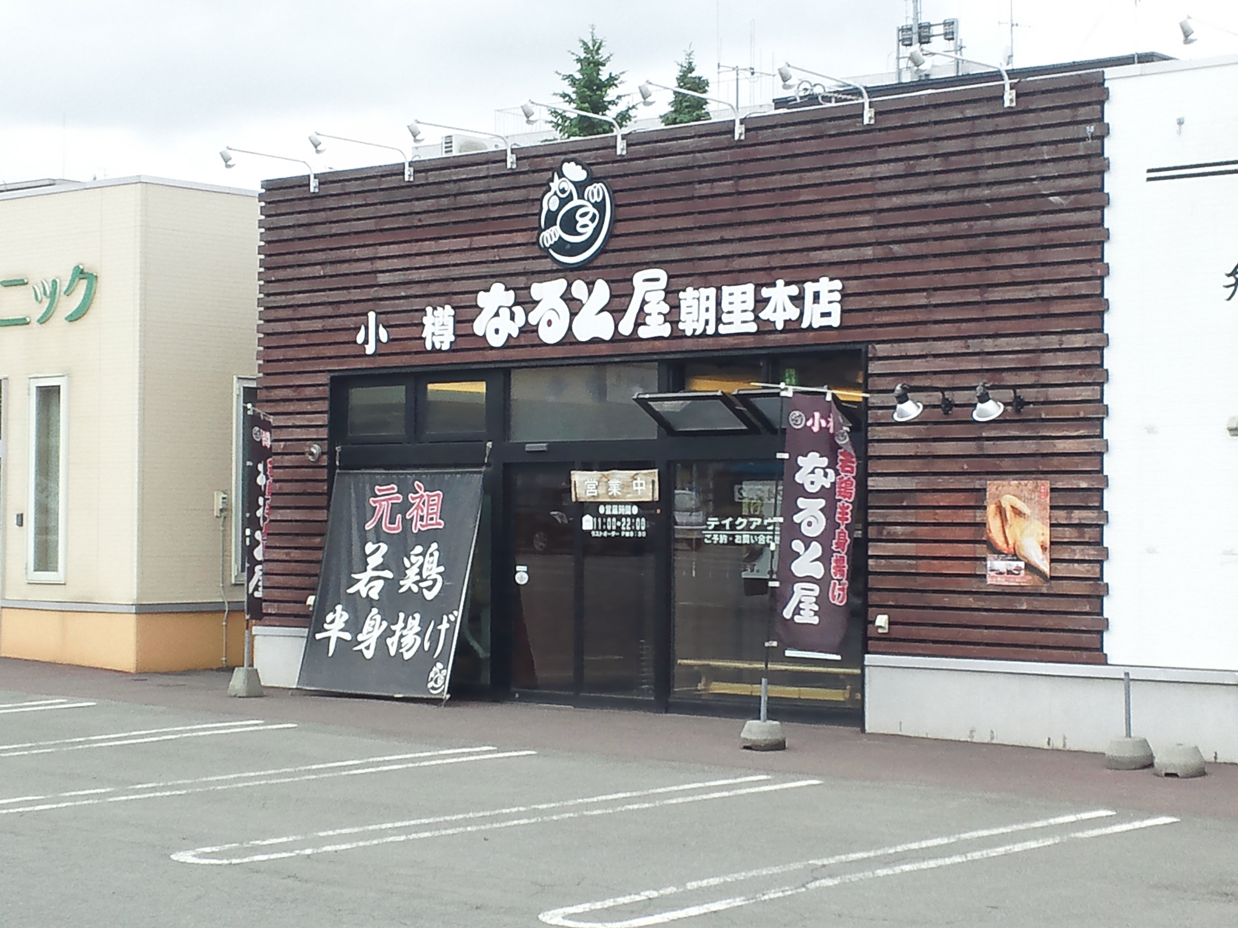 小樽なると屋 朝里本店 北海道小樽市に所在する飲食店